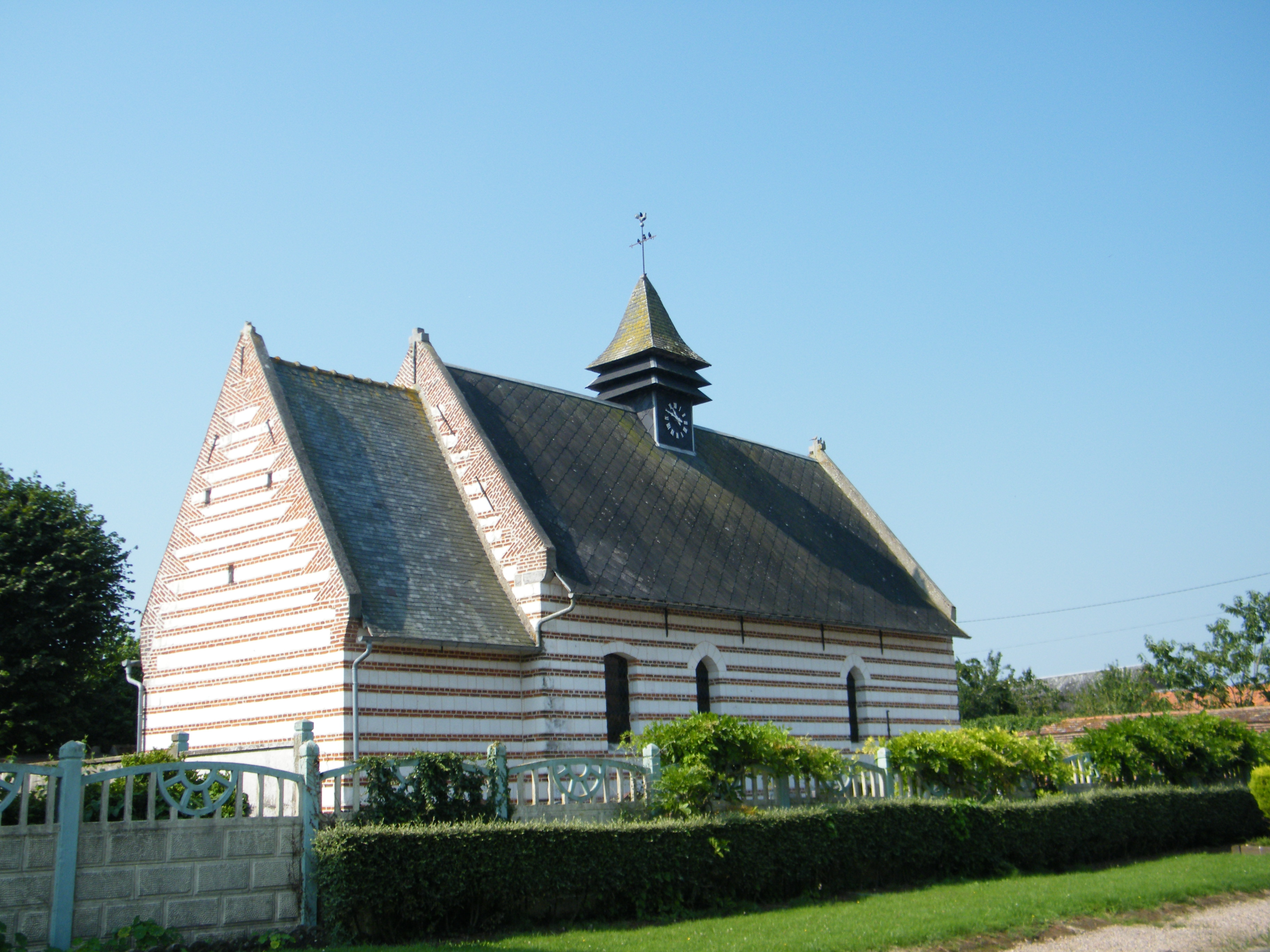 église.